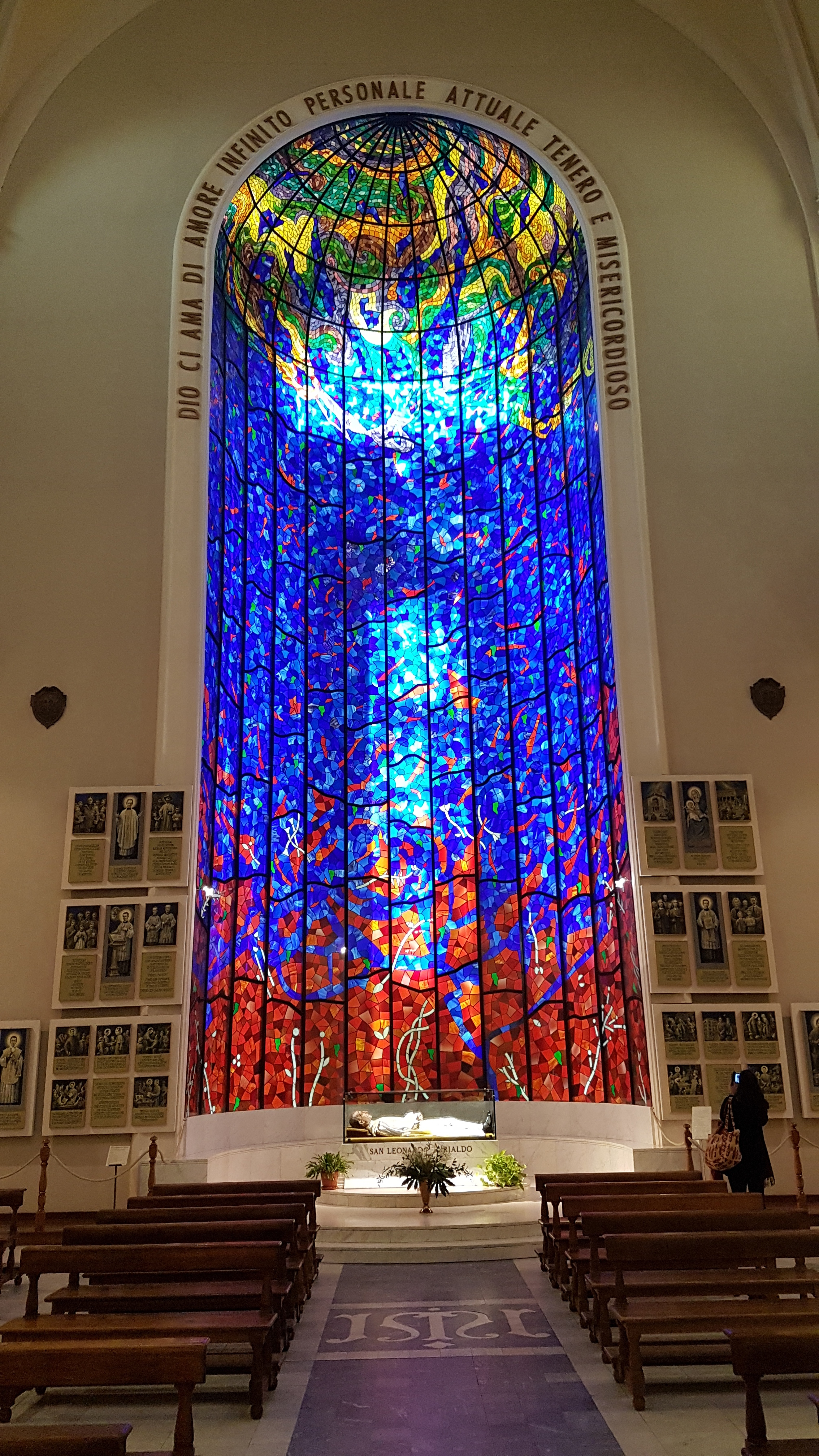 La tomba di san Leonardo Murialdo nella Chiesa della Salute a Torino sormontata da una grande vetrata poilicroma.